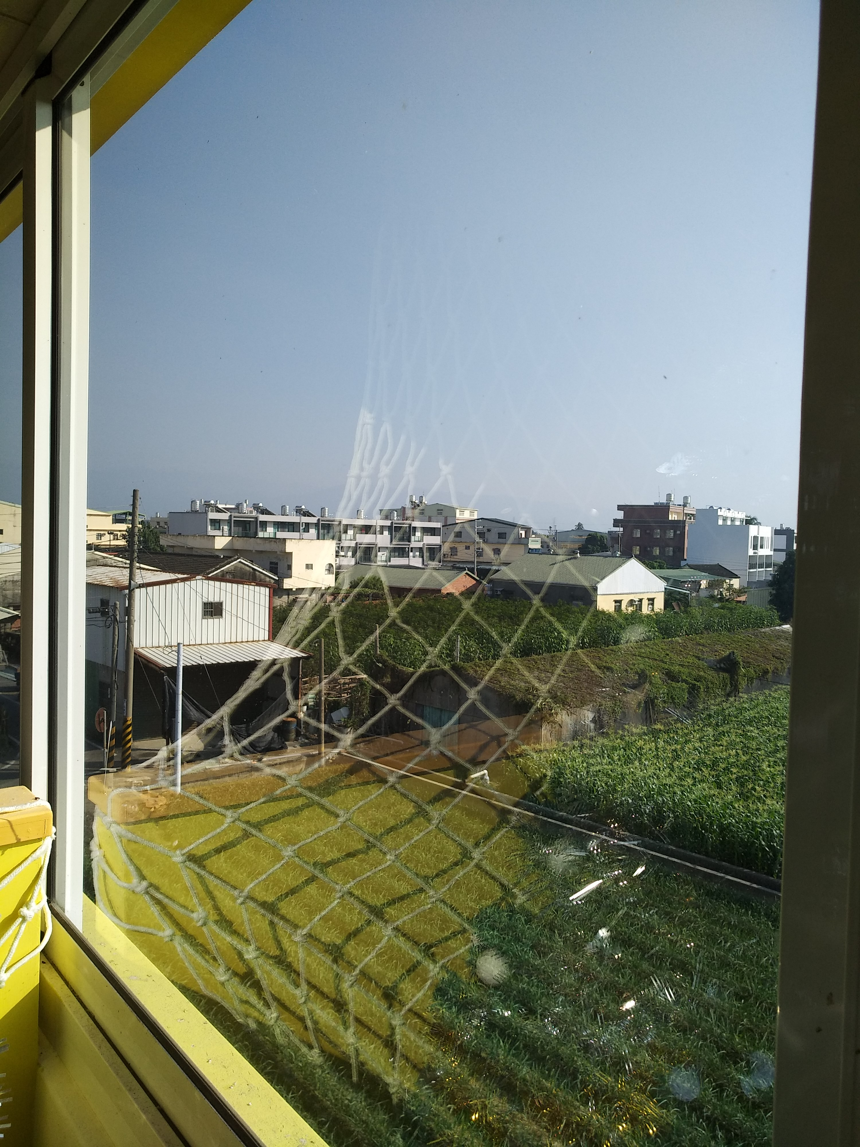 虎尾堀頭景觀